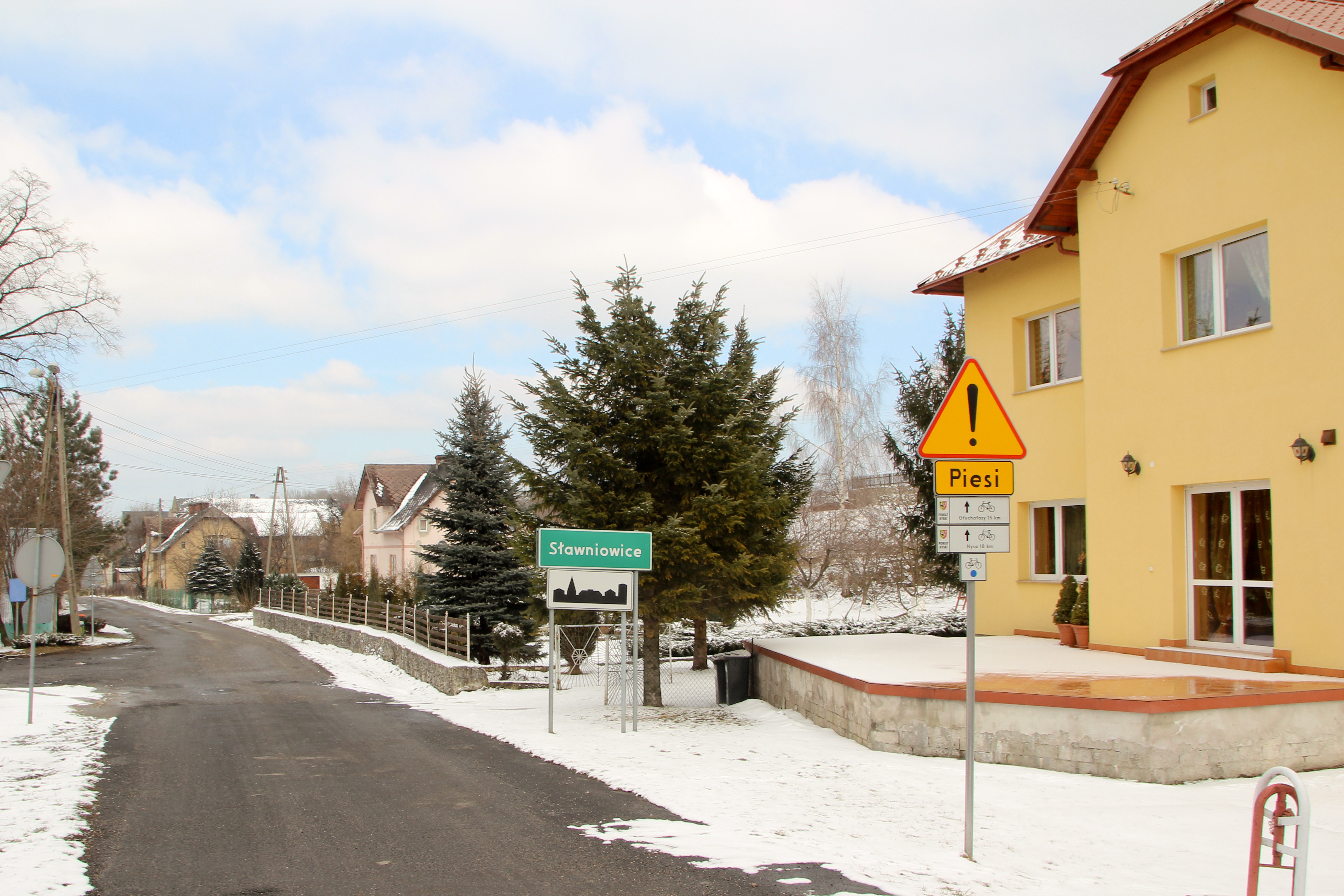 Sławniowice – wieś w Polsce, w województwie opolskim, w powiecie nyskim, w gminie Głuchołazy.